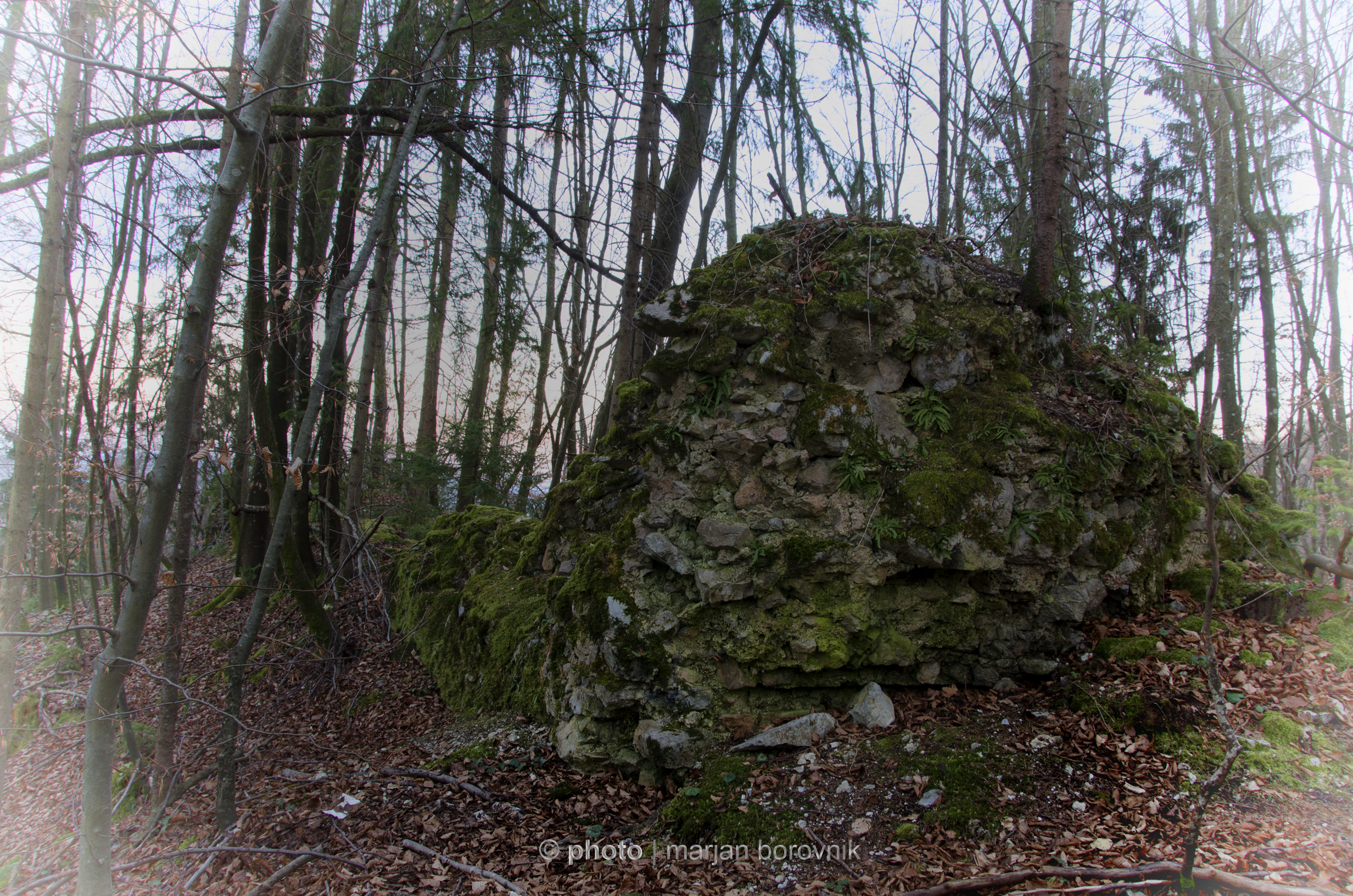 Grad danes. Nekoč mogočen danes samo še del sten.